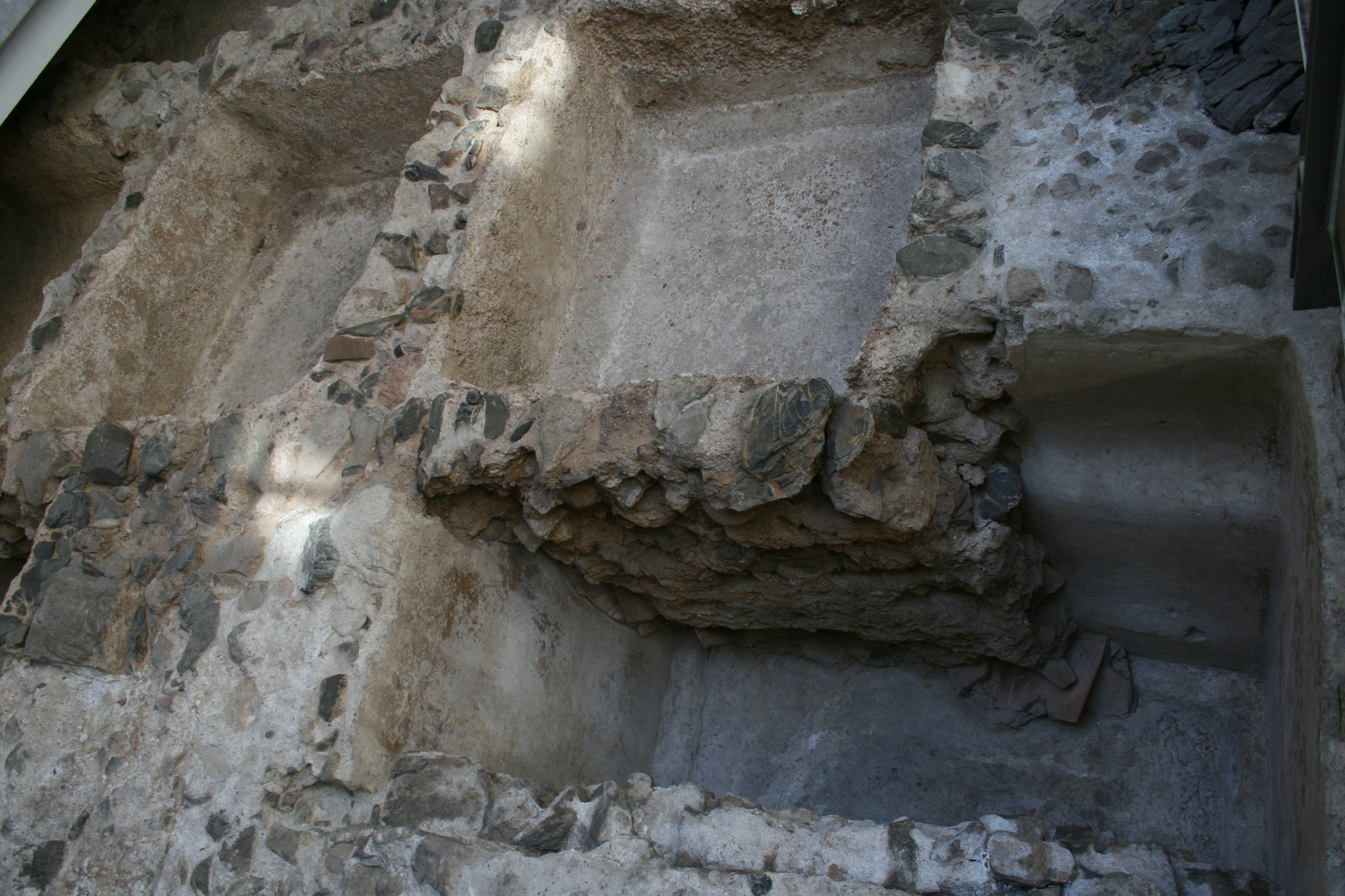 Garum Factory - (Málaga - Rectorado)